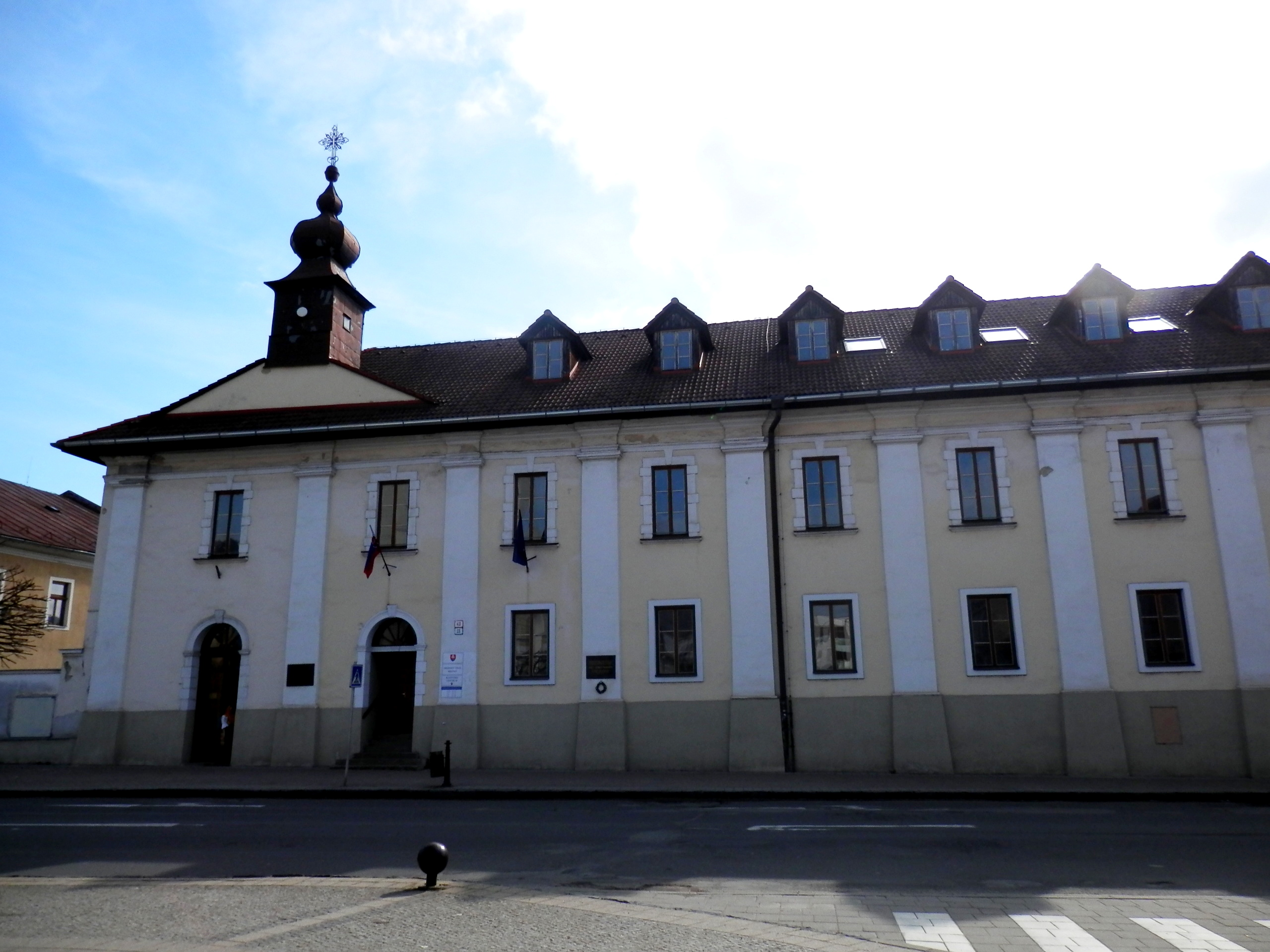 Piaristický kláštor vľavo kláštorná kaplnka Doba vzniku 1694-1713. Prevládajúci sloh barokový. Štefánikovo námestie, mesto Brezno.